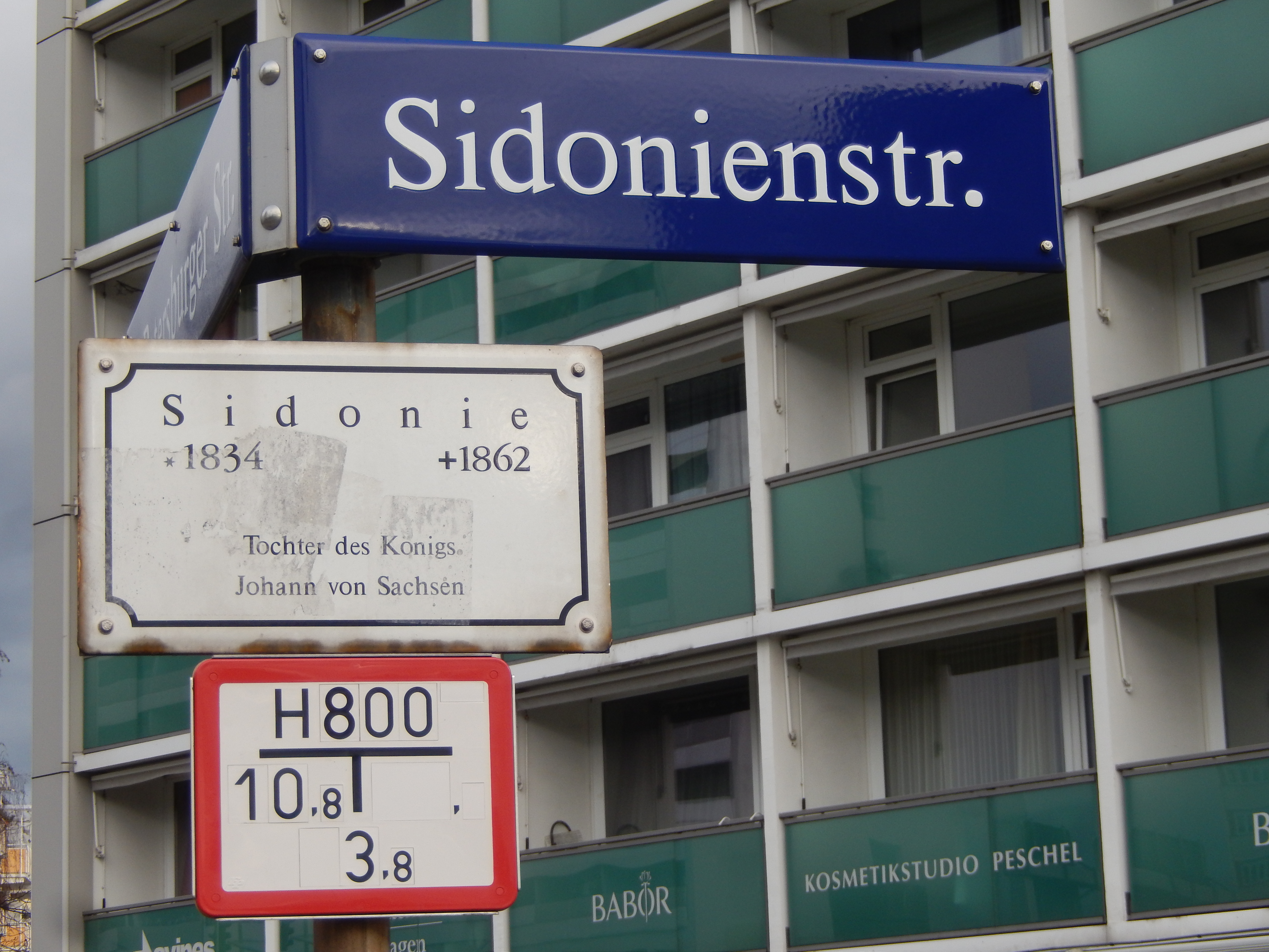 Dresden-Seevorstadt: Siemenshaus Sidonienstraße.